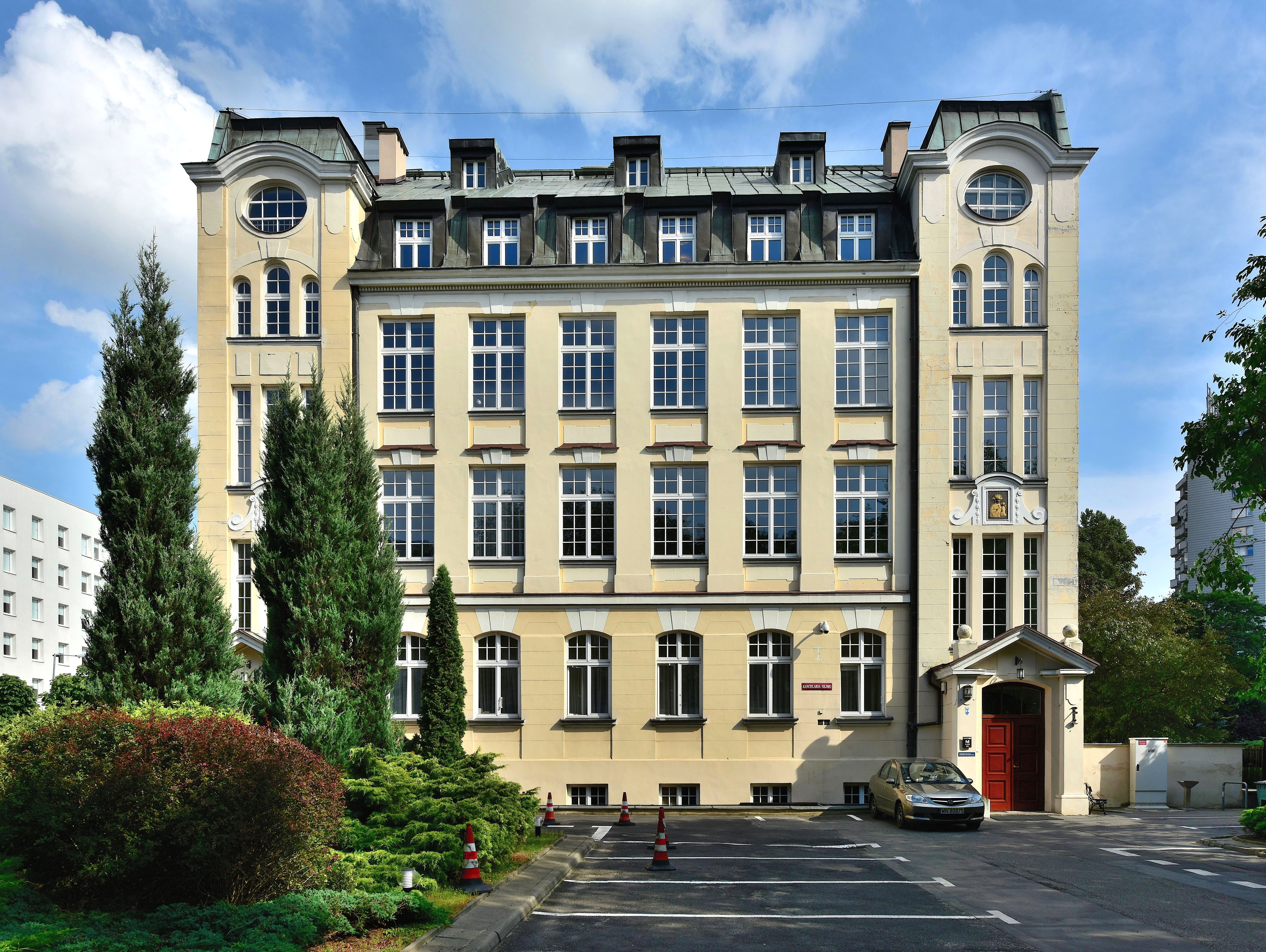 Dom im. Wojciecha Sawickiego przy ul. Zagórnej 3 w Warszawie